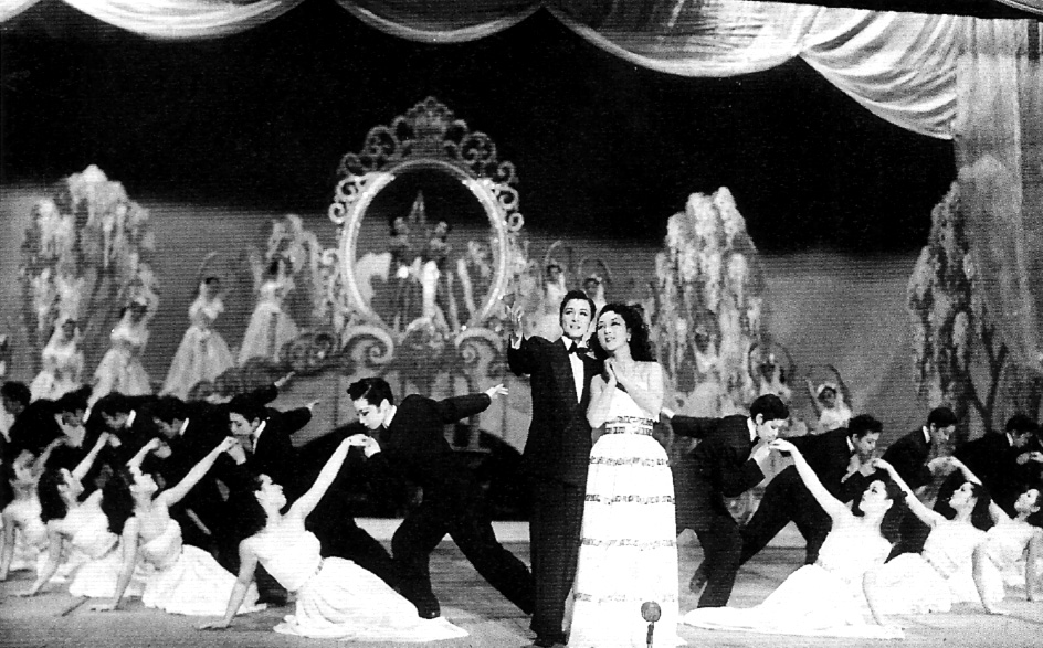 雪組「白き花の悲歌（エレジー）」。中央：春日野八千代(Kasugano Yachiyo)・朝倉道子(Asakura Michiko)